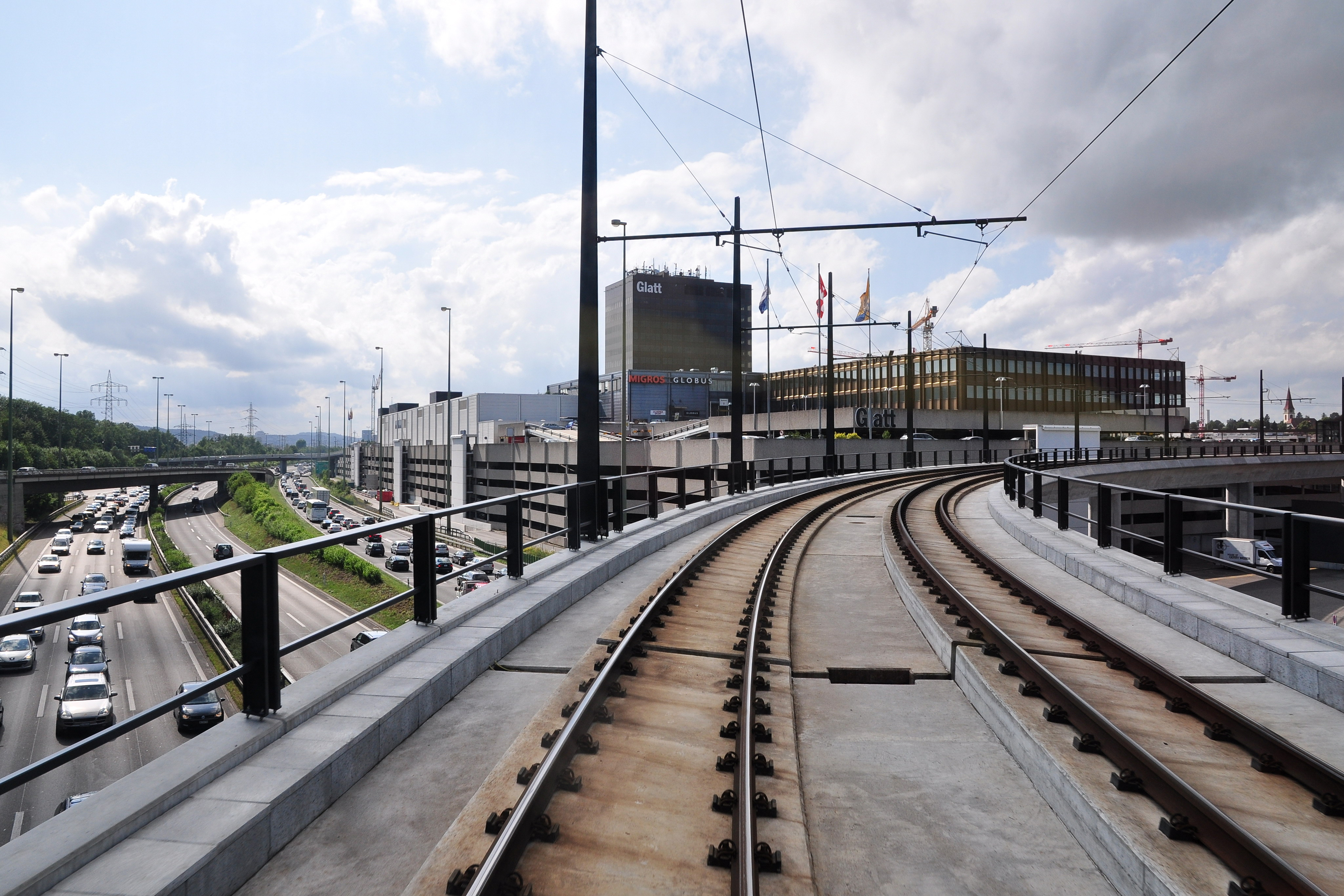 Glattzentrum and A1 motorway as seen from the Glattalbahn S12 line towards Dübendorf (Switzerland)